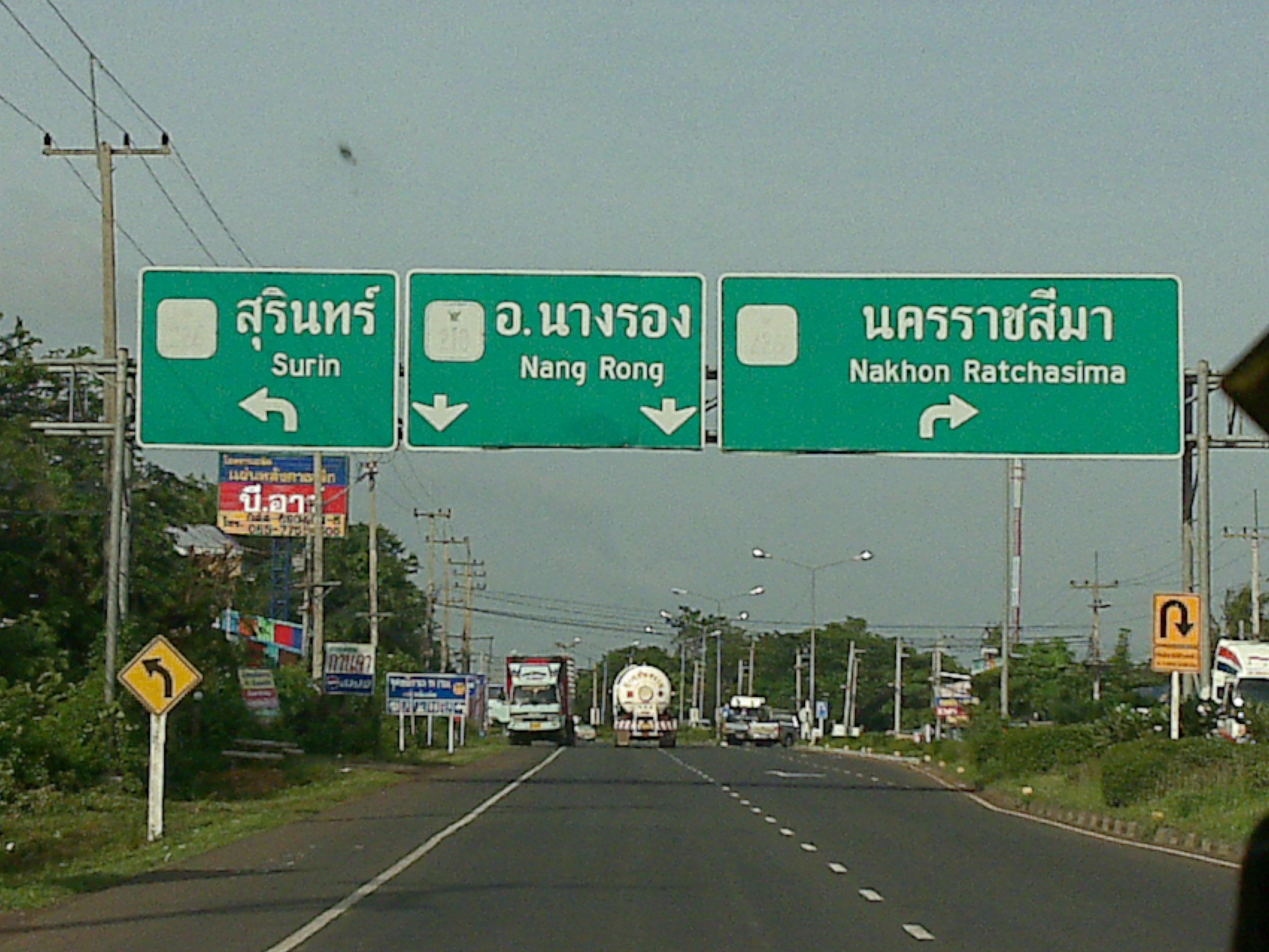 Road Sign in Buriram, Thailand